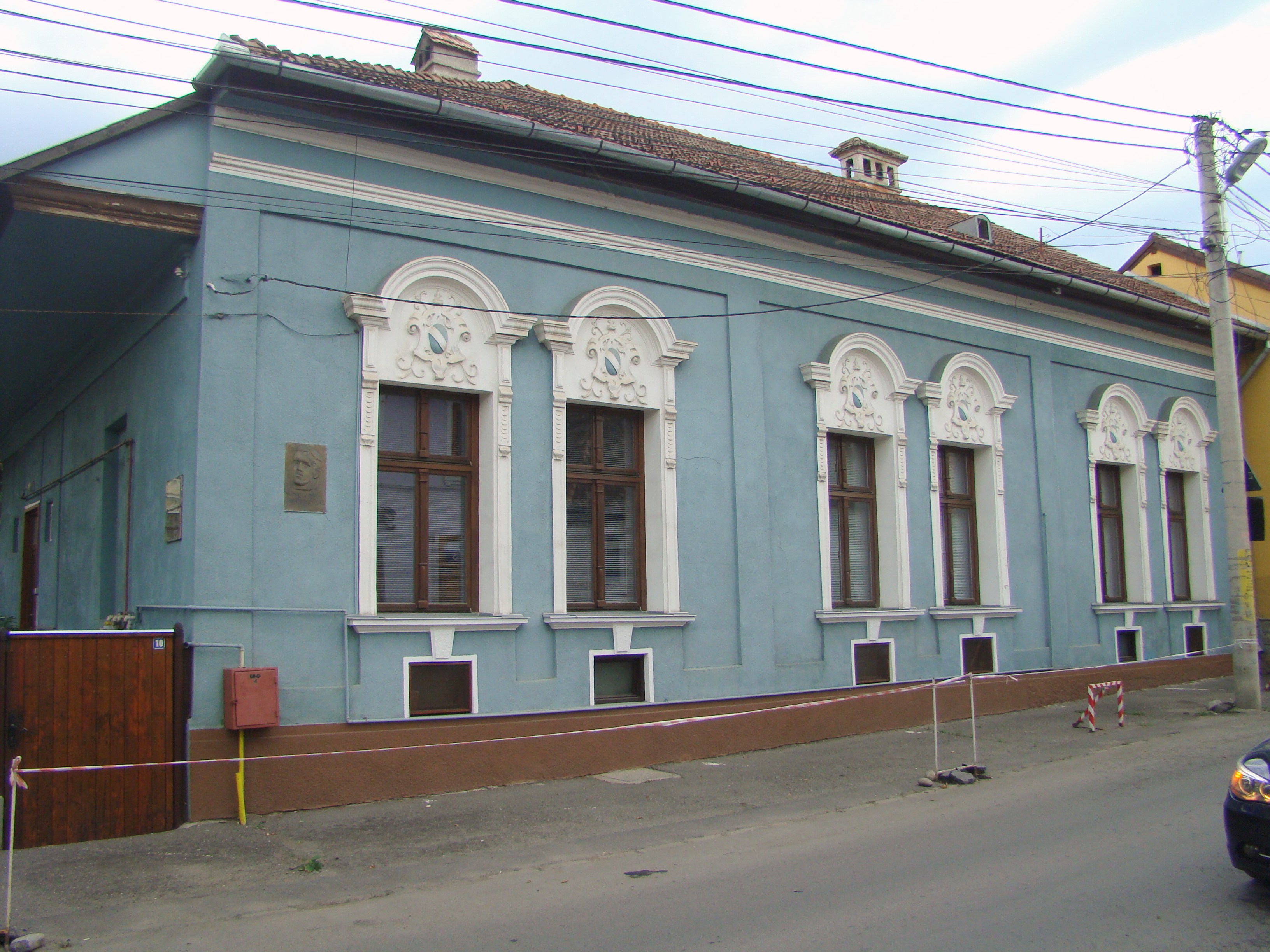 Casa memorială Tompa Lászlo, municipiul Odorheiu Secuiesc, str. Tompa László 14 cca. 1900